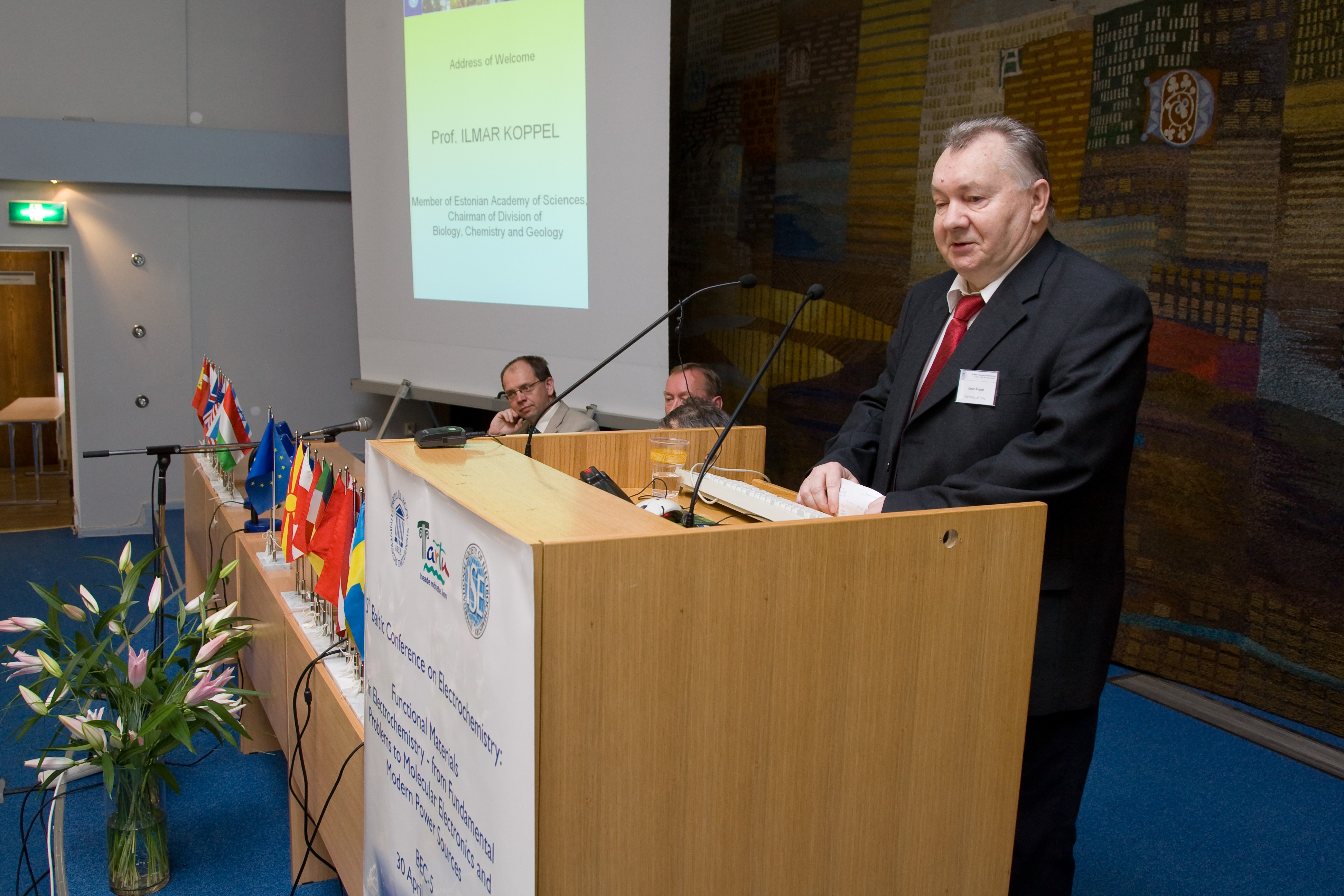 30. aprillist kuni 3. maini 2008 toimus rahvusvaheline V Balti elektrokeemia konverents (BEC-5). Konverentsi 1. päev. Esineb Tartu Ülikooli teadustöö asedirektor, uurija-professor Ilmar Koppel.